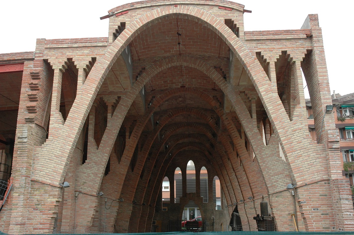 Celler Cooperatiu Sant Cugat (by Cèsar Martinell i Brunet)